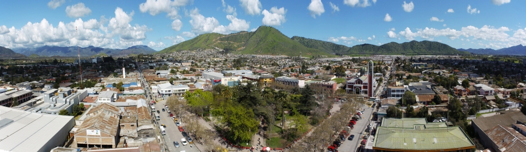 Panoramica tomada desde el Mall de Melipilla